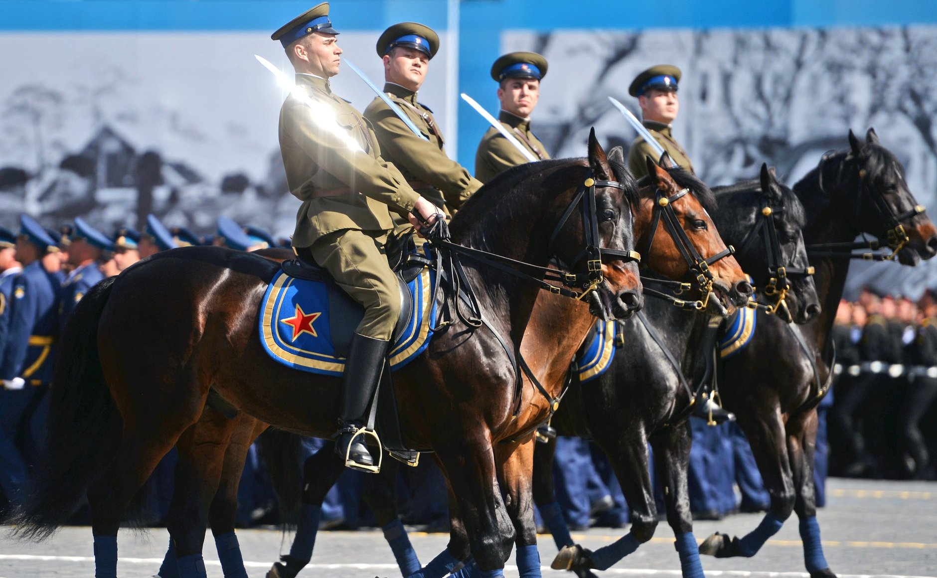 Военнослужащие парадных расчетов во время военного парада в ознаменование 70-летия Победы в Великой Отечественной войне 1941–1945 годов.